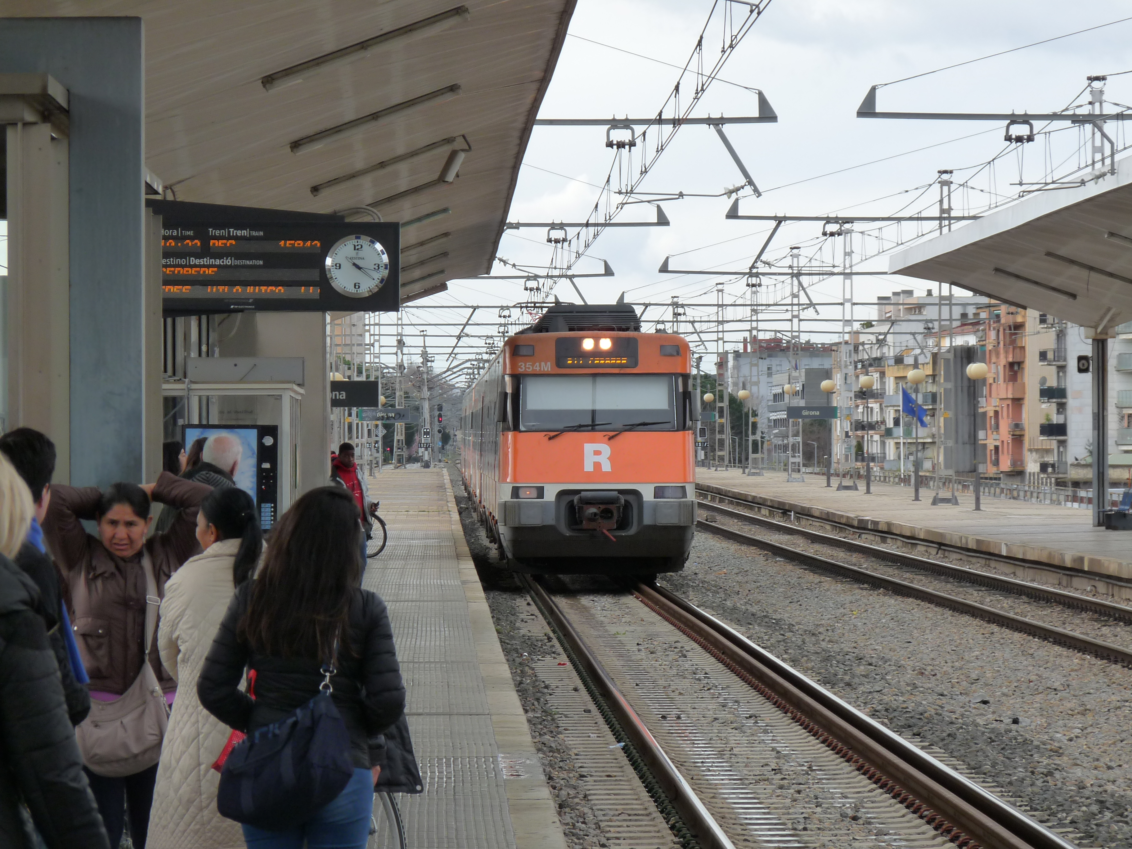 Girona station. Een lokale trein naar Cerbere, Frankrijk.